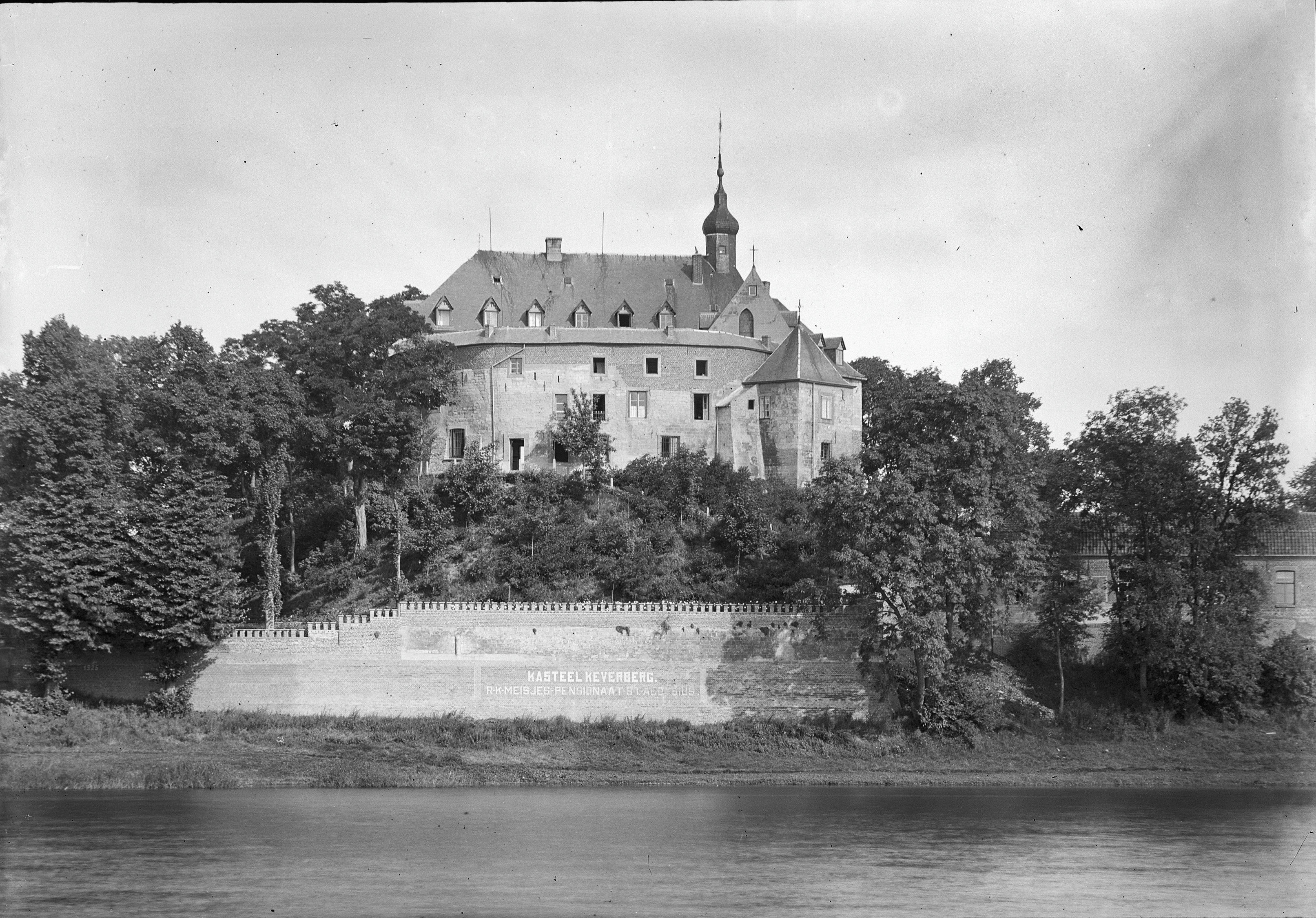 Kasteel De Keverberg: Overzicht vanuit het zuiden